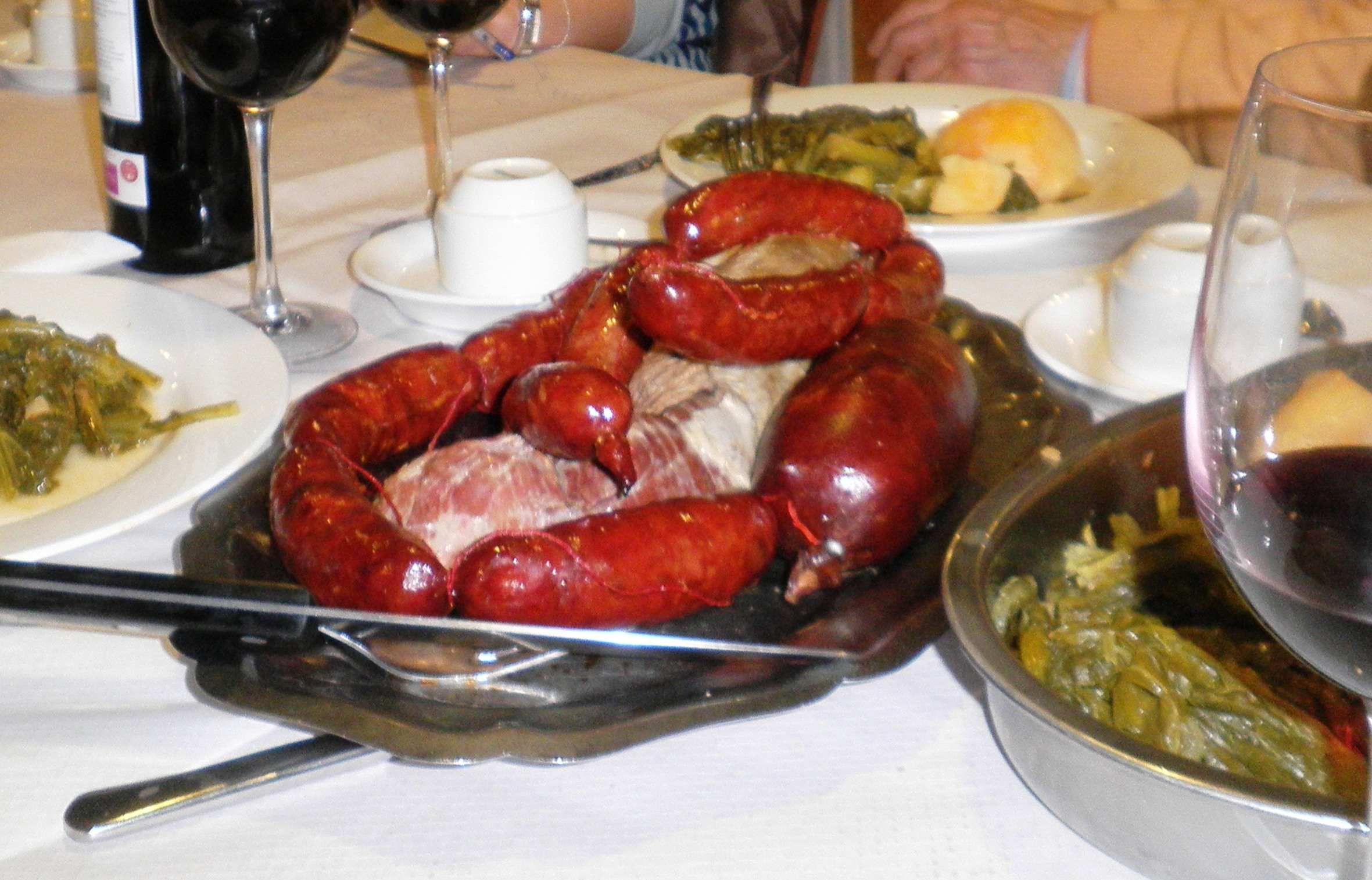 Lacón con grelos (2): chourizos, androlla, xarrete de vaca, grelos e patacas.